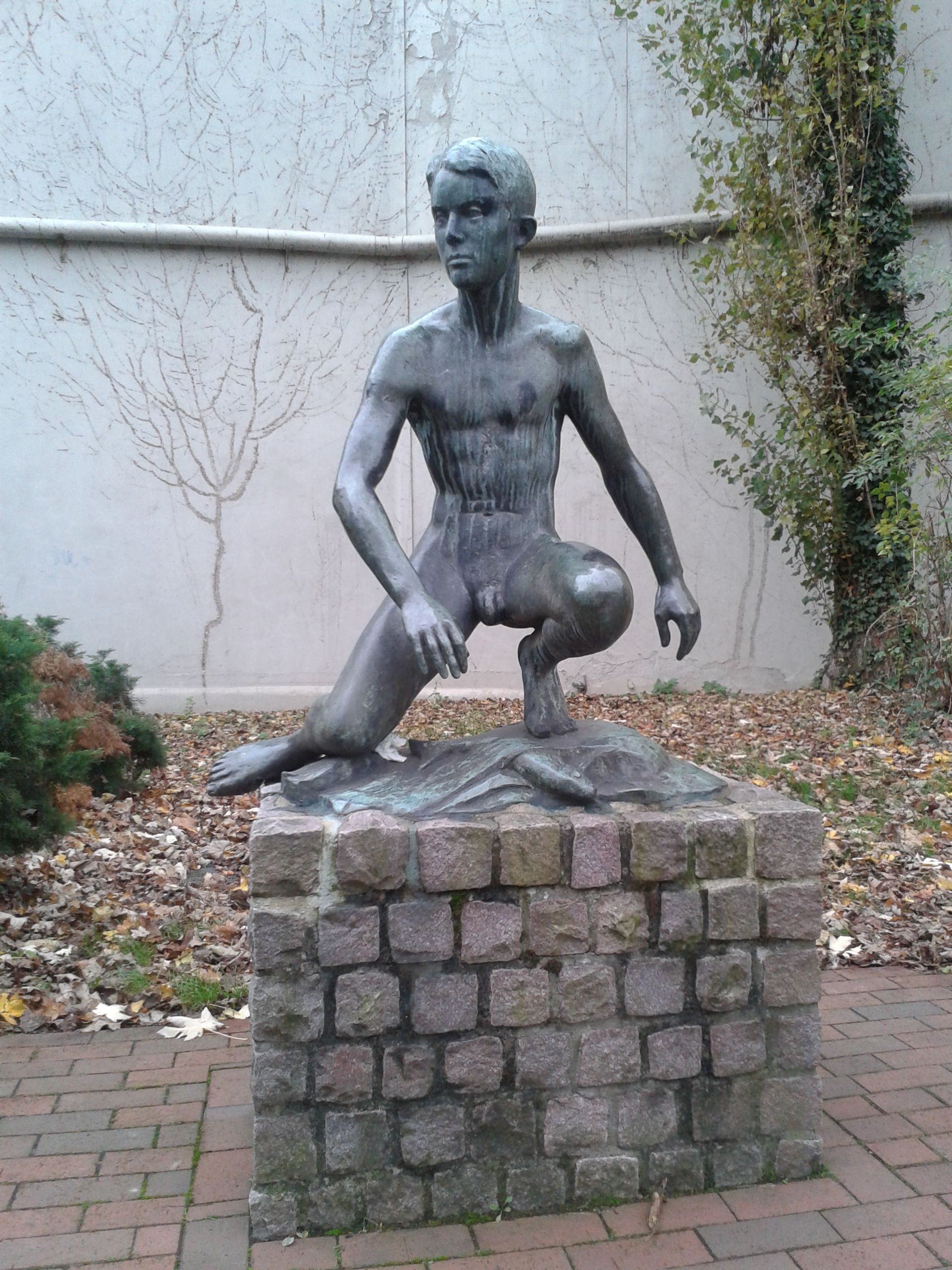 ursprünglich: Brunnenplastik aus Bronze "Jüngling" von Ivo Beucker (1938), Standort: Schulhof des Humboldt-Gymnasiums in Düsseldorf, früher als Brunnenfigur auf dem Schulhof des Hindenburg-Gymnasiums, Düsseldorf, Brunnen im 2. Weltkrieg zerstört